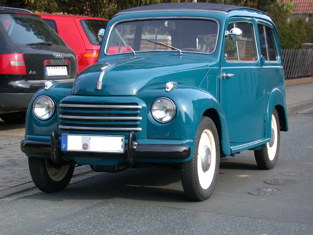 NSU-Fiat 500C (Topolino), Karosserie Belvedere, restauriertes Fahrzeug